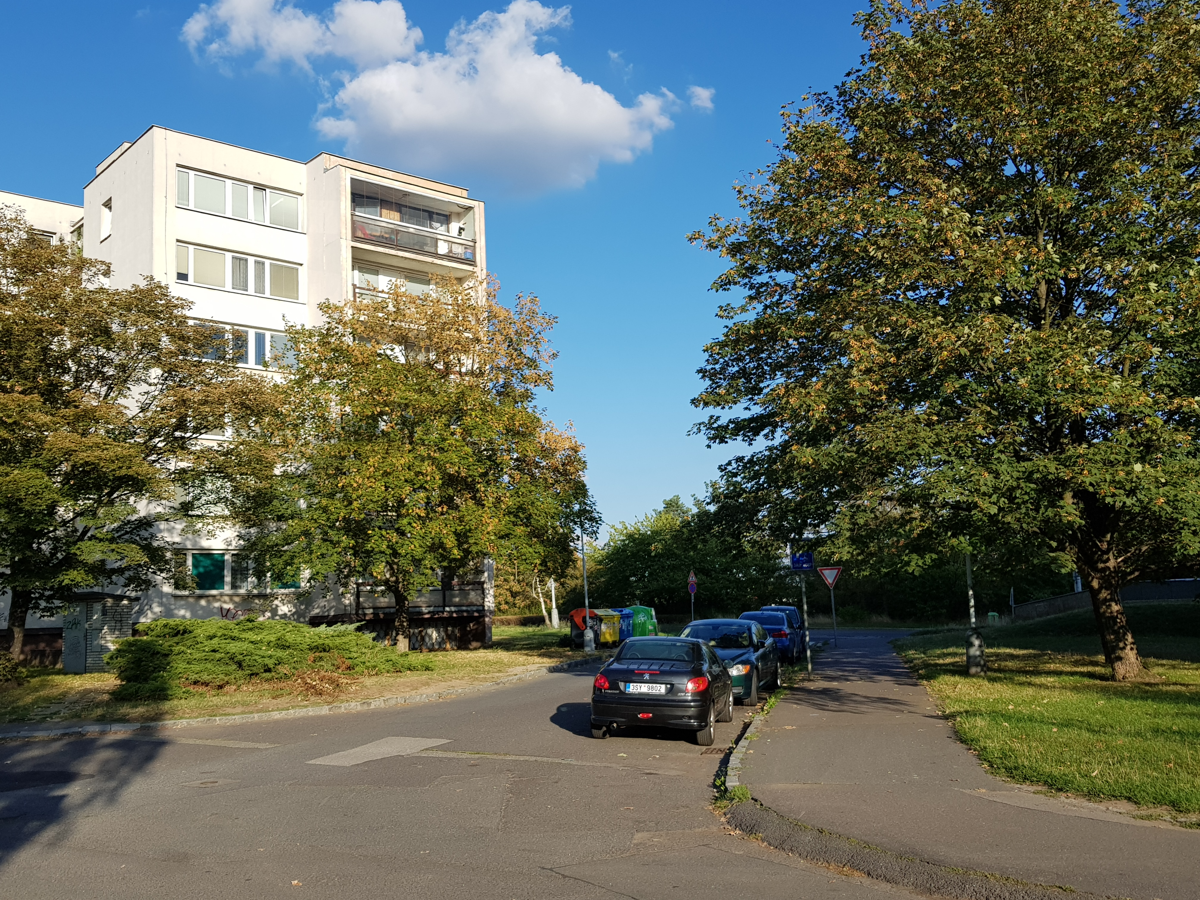 Žárská, Praha 14 - Lehovec, pohled jihovýchodním směrem